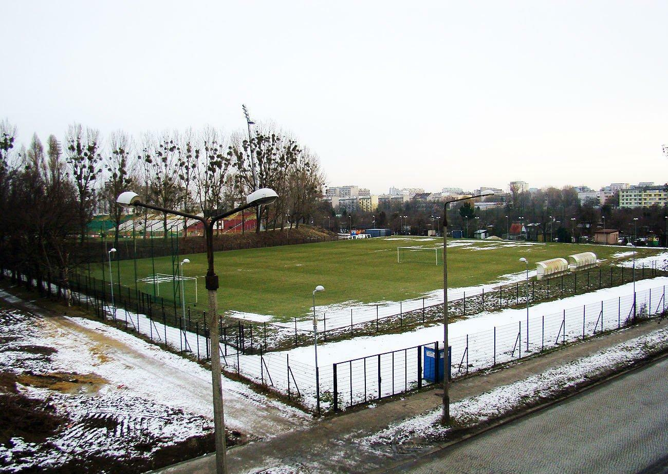 Boisko treningowe WKS Śląsk